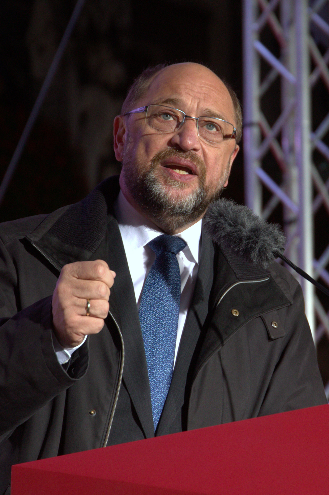 Martin Schulz, deutscher Politiker (SPD). Im Jahr 2017 SPD-Vorsitzender und Kanzlerkandidat der SPD für die Bundestagswahl. Hier am 14. September 2017 während einer Wahlkampfveranstaltung der SPD auf dem Marienplatz in München. Titel des Werks: "Martin Schulz (SPD), Wahlkampf in München, September 2017".